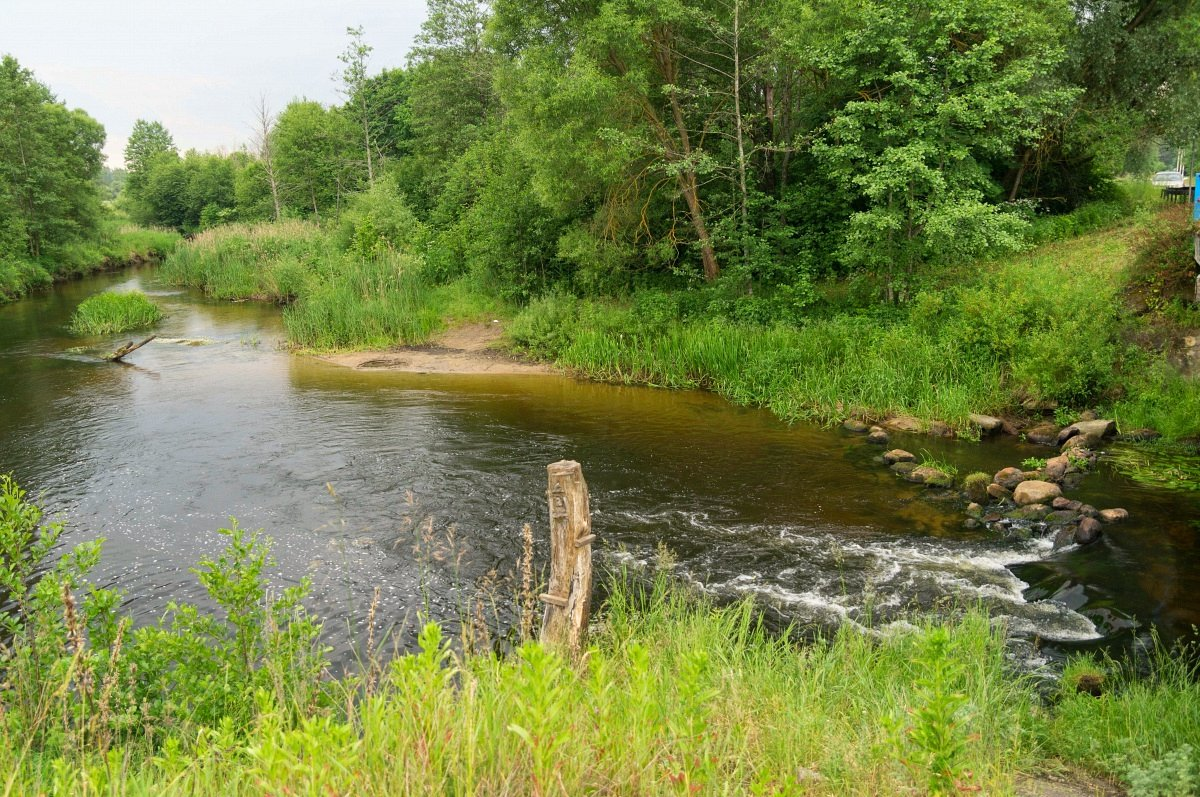 Іжа. Млын